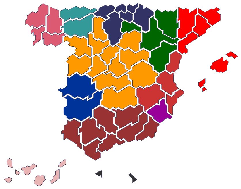 Mapa confederal de la CNT